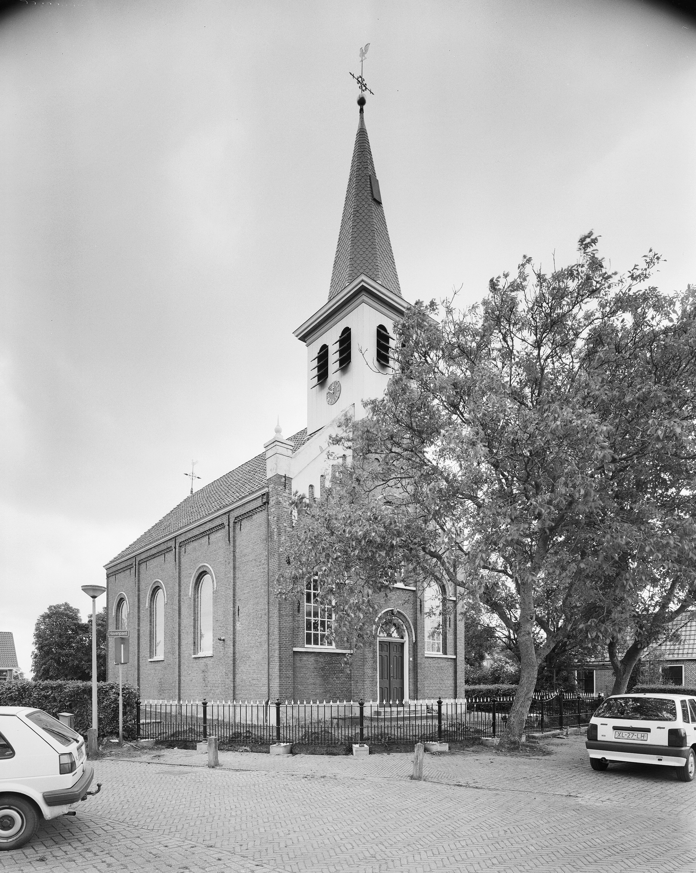 Nederlands Hervormde Kerk: Overzicht noordwestgevel met geveltoren (opmerking: Gefotografeerd voor Monumenten In Nederland Friesland, bladzijde 269)